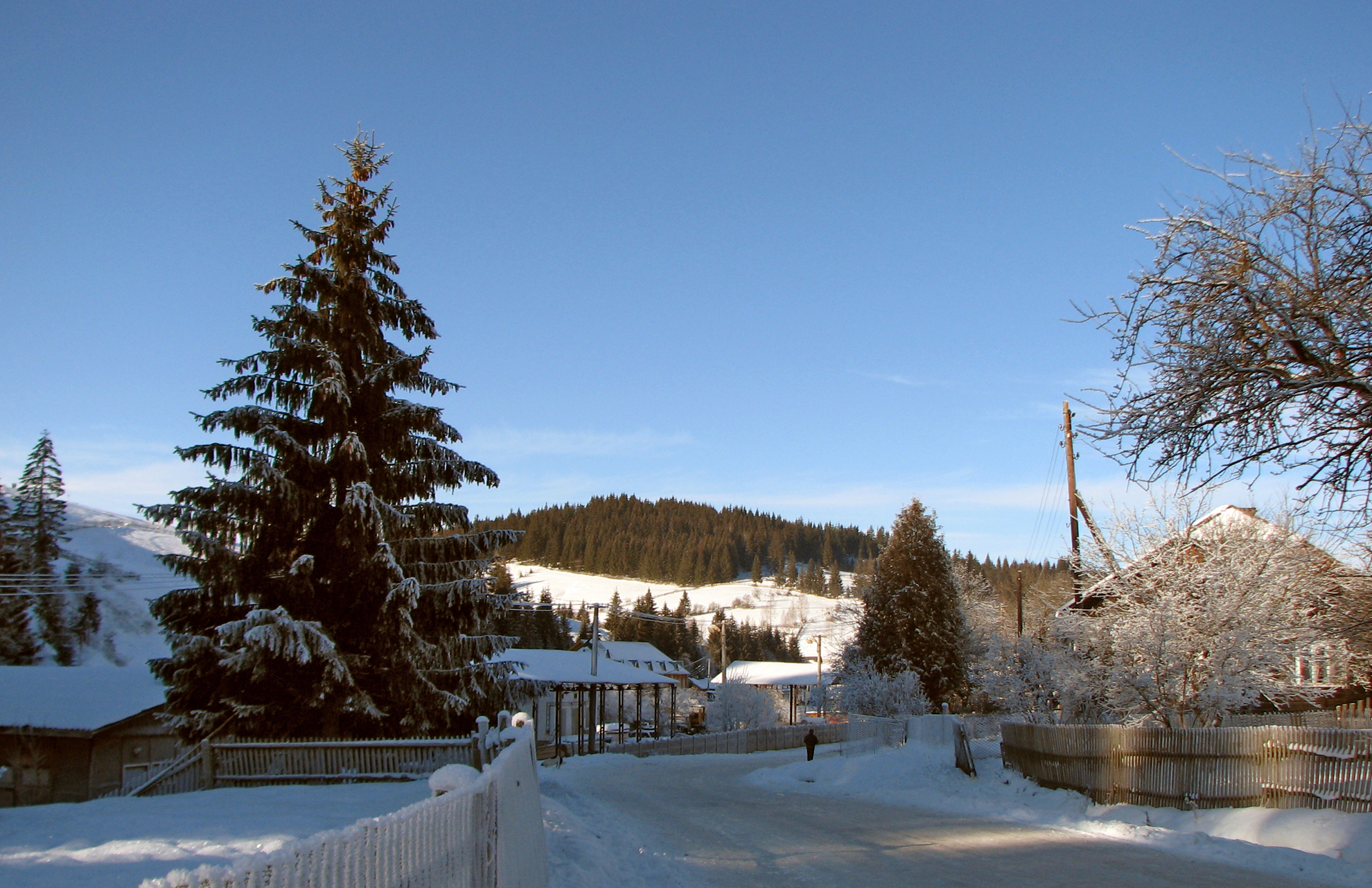 Vishkiv